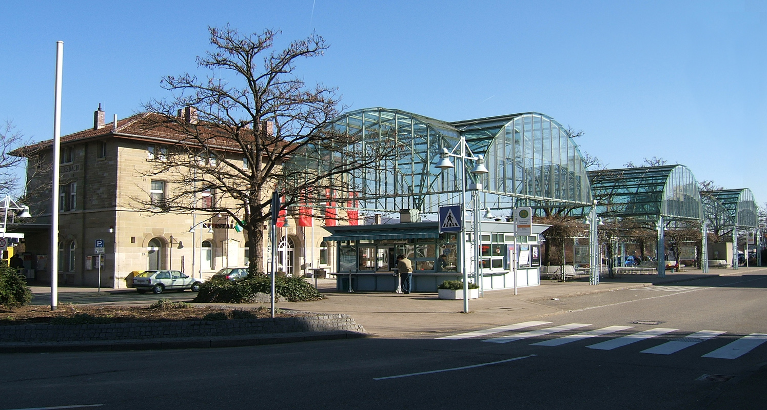 Busbahnhof in Weinstadt-Endersbach, Baden Württemberg, Deutschland